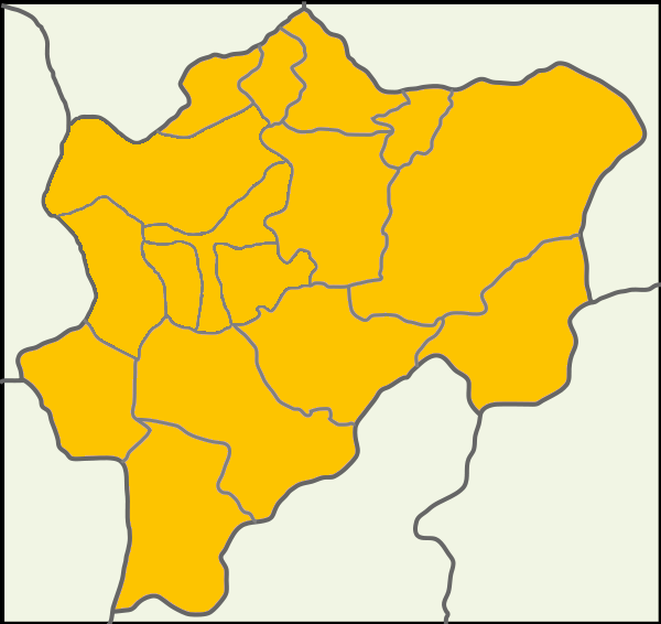 Kayseri'de 2014 Türkiye cumhurbaşkanlığı seçimi